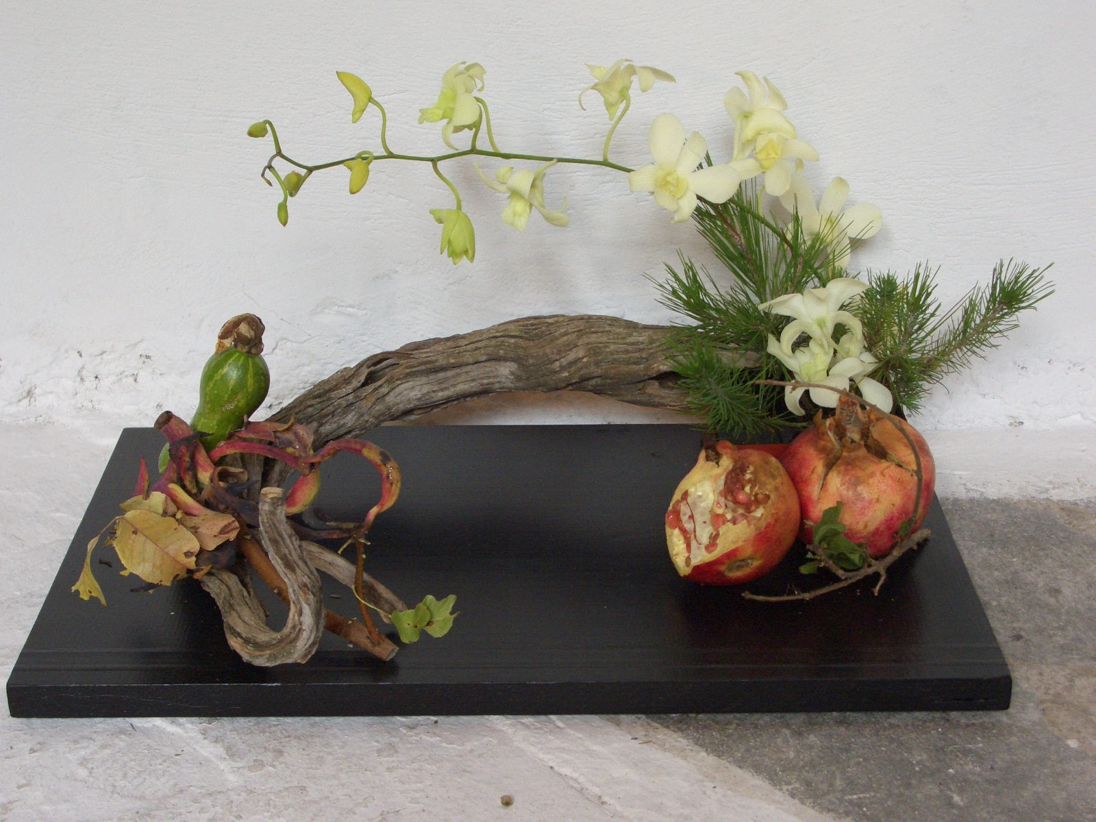 Composizione Ikebana. Foto scattata al seminario Eota (European Ohara Teachers Association) svoltosi in Grecia nell’ottobre 2005. Composizione e foto eseguite da Rossella F. secondo master associato della Scuola Ohara di Tokyo, che ne autorizza il rilascio con la licenza sottoindicata.